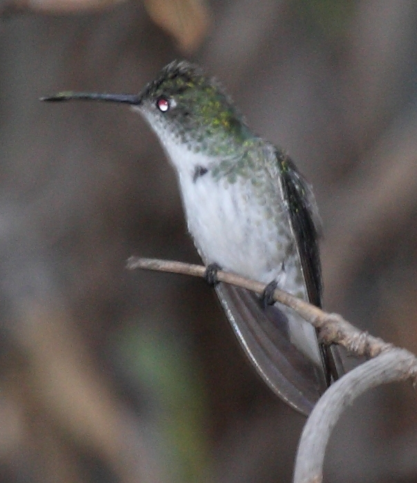 White-bellied Hummingbird in Peru